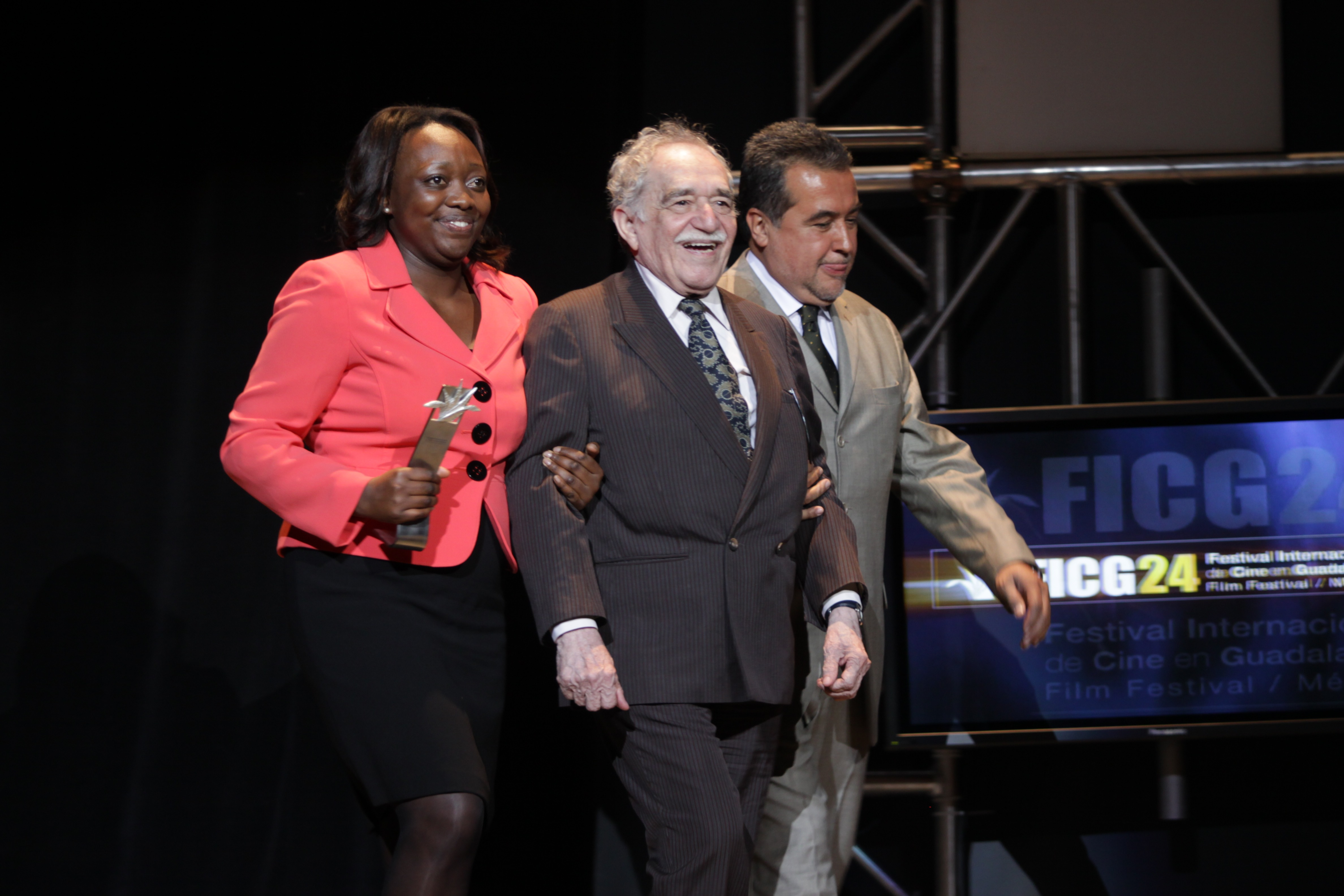 19/03/2009 La Ministra de Cultuta de Colombia Paula Moreno y el escritor colombiano Gabriel García Marquez fueron los encargados de entregar el Mayahuel de Plata a Victor Gaviria